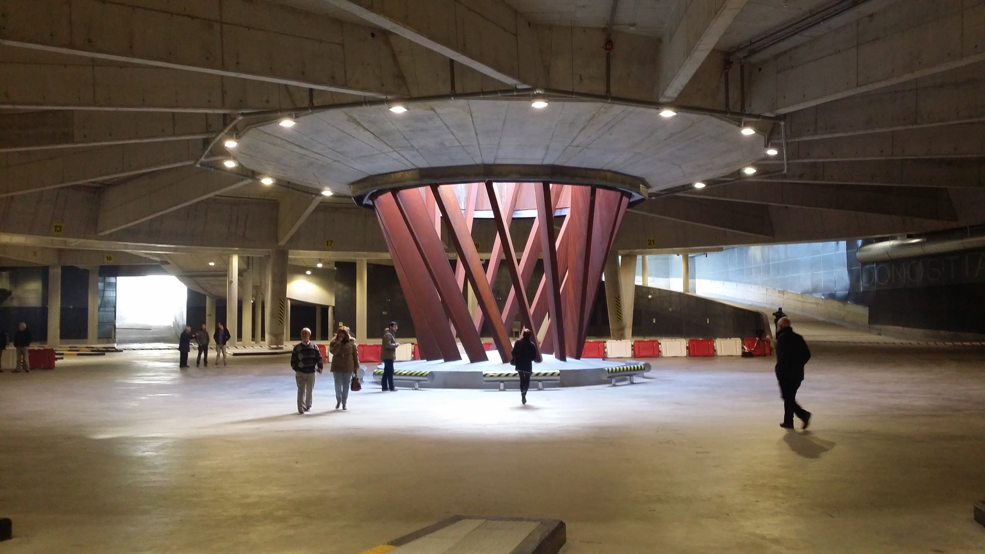 Donostiako autobus geltokia